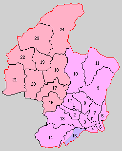 京都府船井郡の町村制時点の町村。